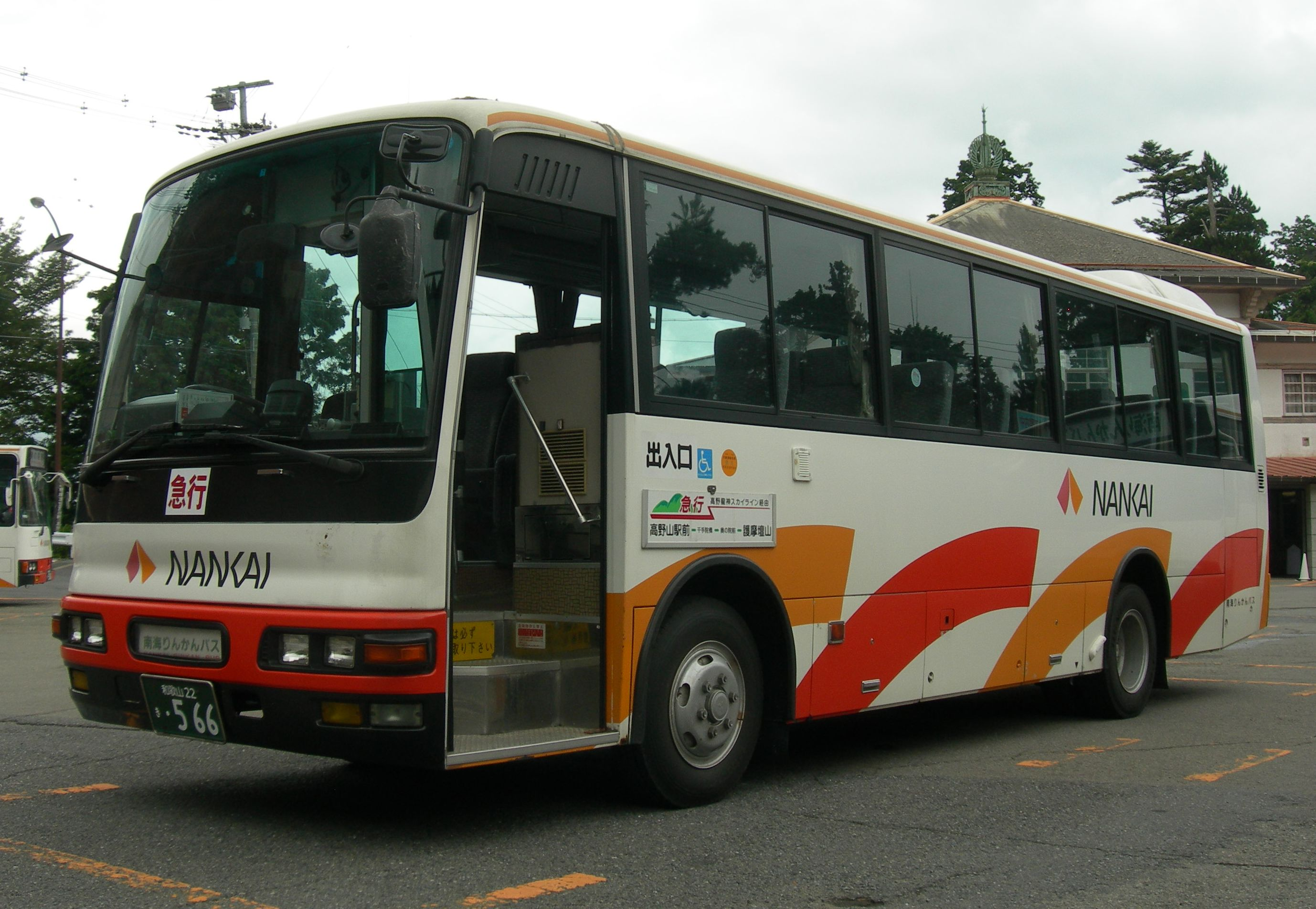 南海りんかんバス